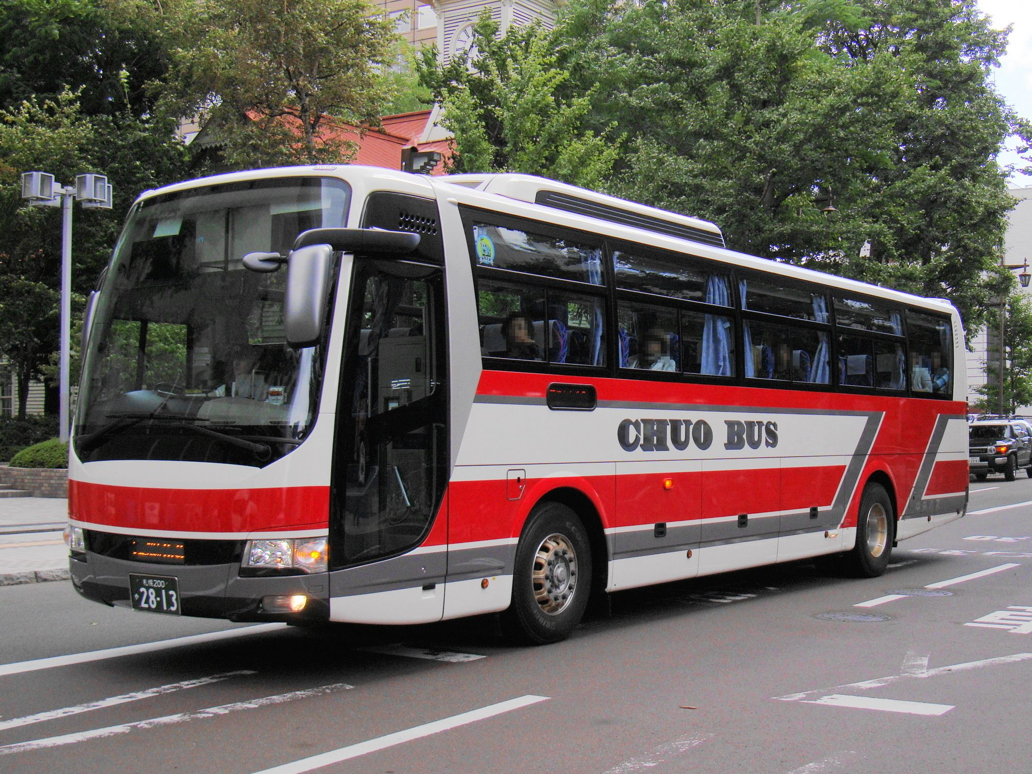 "Kōsoku Otaru gō" Otaru to Sapporo